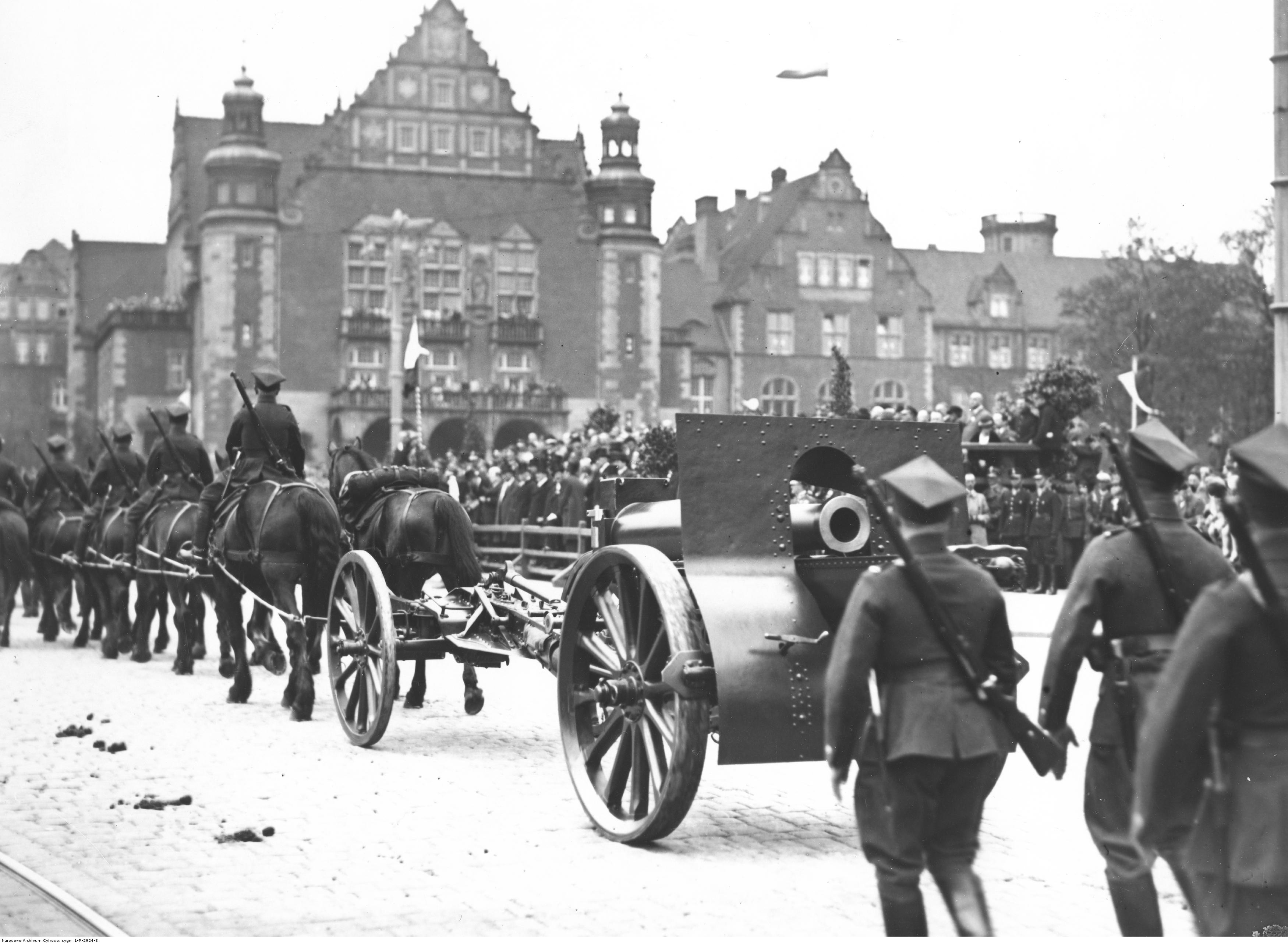 Święto Narodowe Trzeciego Maja – uroczystości w Poznaniu; 1936 r. Oddziały artylerii podczas defilady na ulicy Święty Marcin. Widoczna 155 mm haubica Schneider wz. 1917 z zaprzęgiem. W głębi widoczny budynek Collegium Maius Uniwersytetu Poznańskiego. Koncern Ilustrowany Kurier Codzienny - Archiwum Ilustracji. Sygnatura: 1-P-2924-3